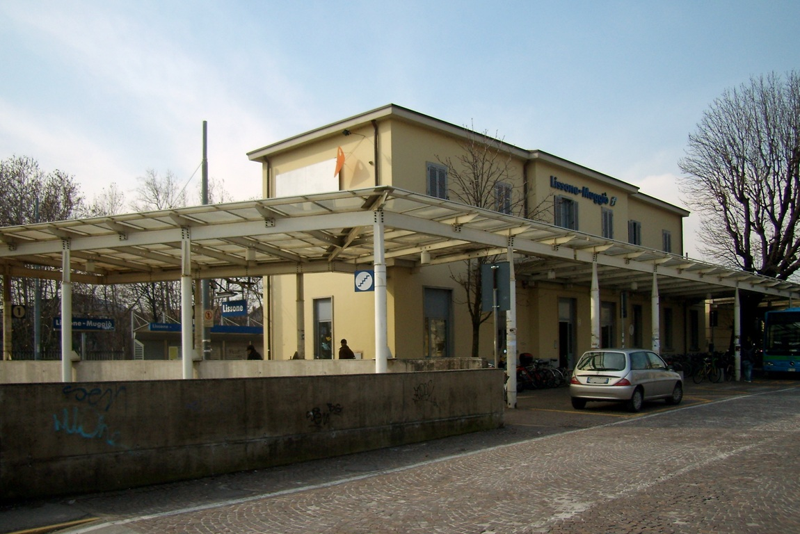 Stazione ferroviaria di Lissone-Muggiò